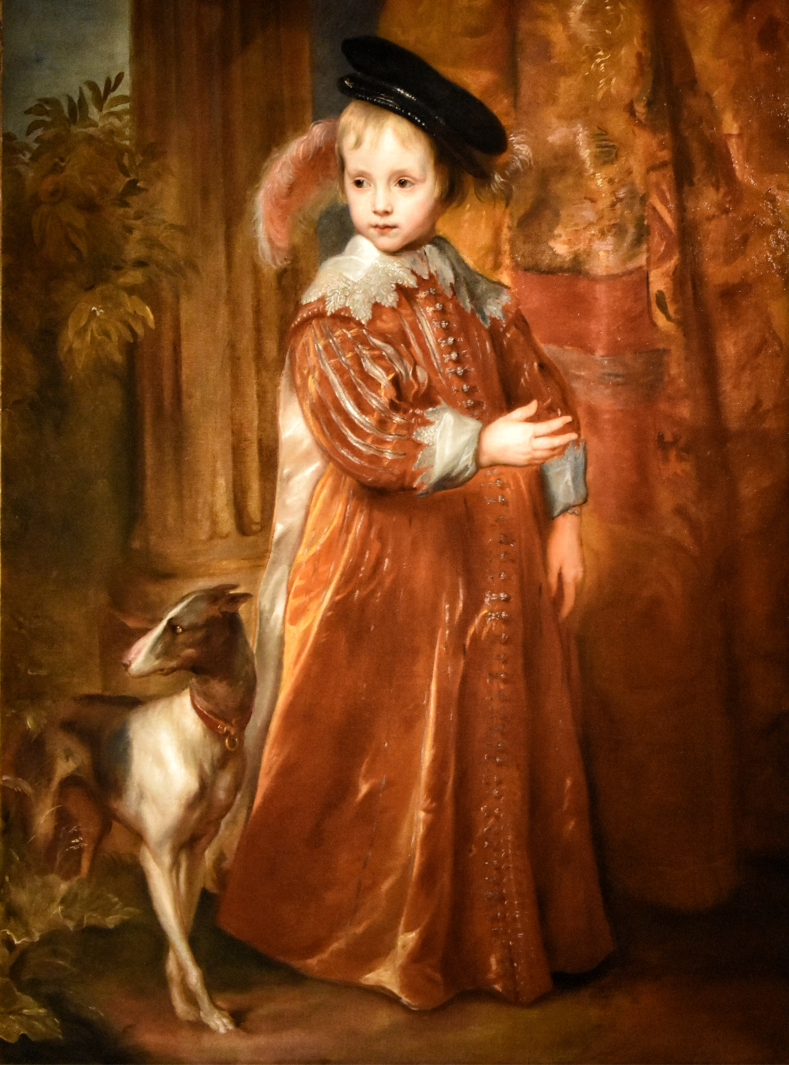 Antoon van Dyck (1599-1641) Portret van Willem II van Oranje - Moorsel 3-09-2019 This photo of movable heritage has been taken in the Flemish Region